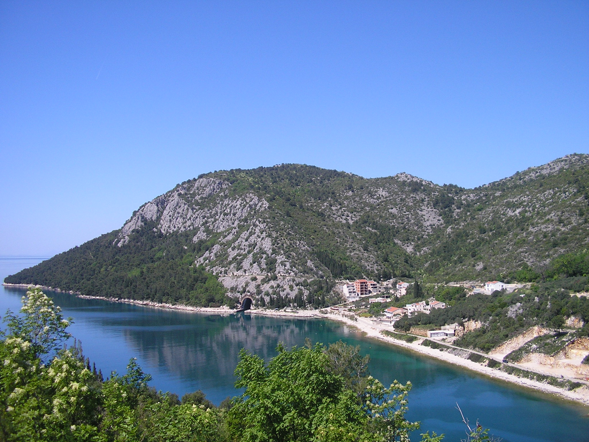 Duba